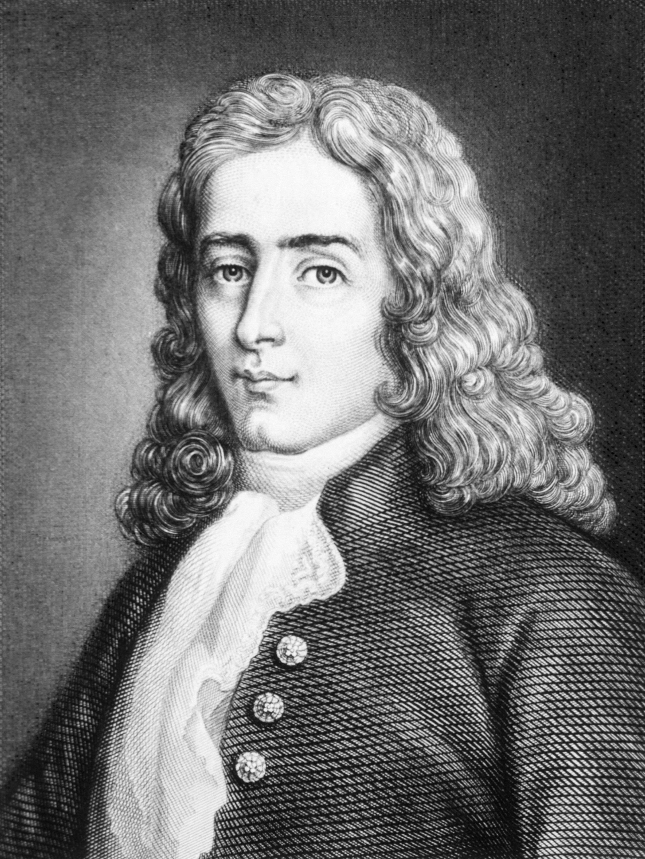 René-Antoine Ferchault de Réaumur